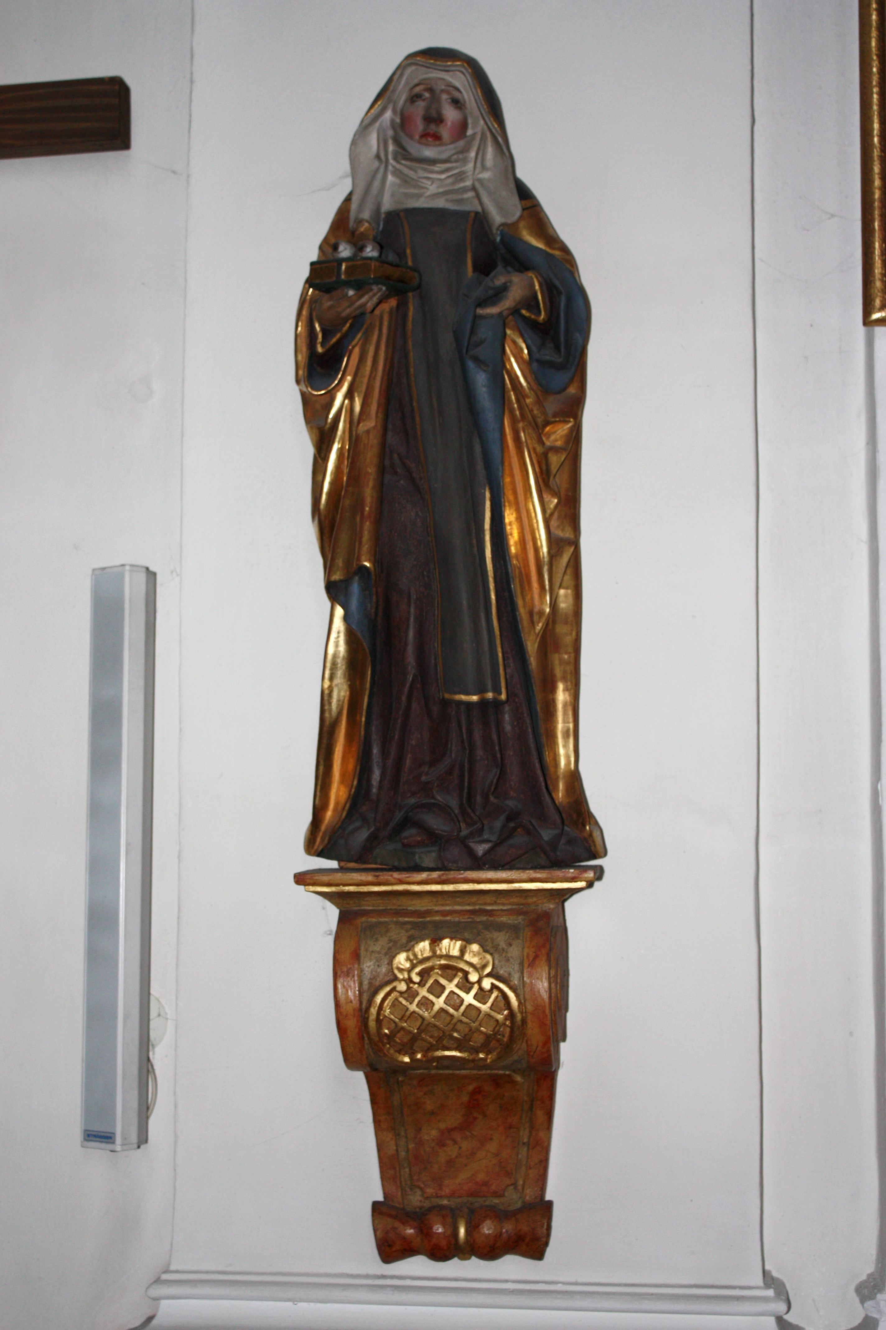 Heilige Ottilie (um 1500), St. Ulrich Amendingen